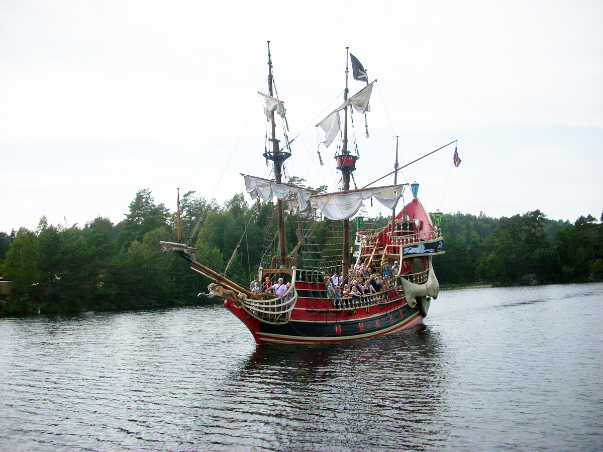 Den sorte dame i Dyreparken i Kr.Sand